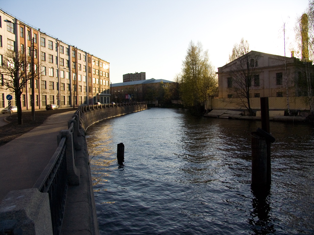 Smolenka river, Sankt Petersburg